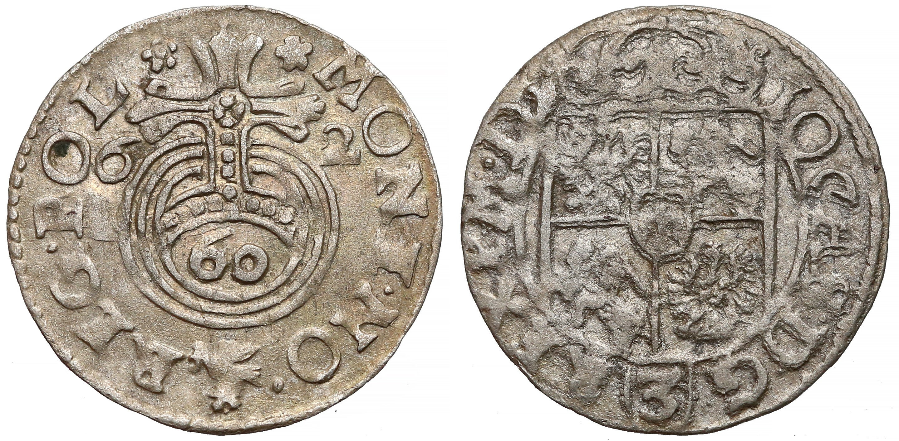 Półtorak koronny 1662 Poznań